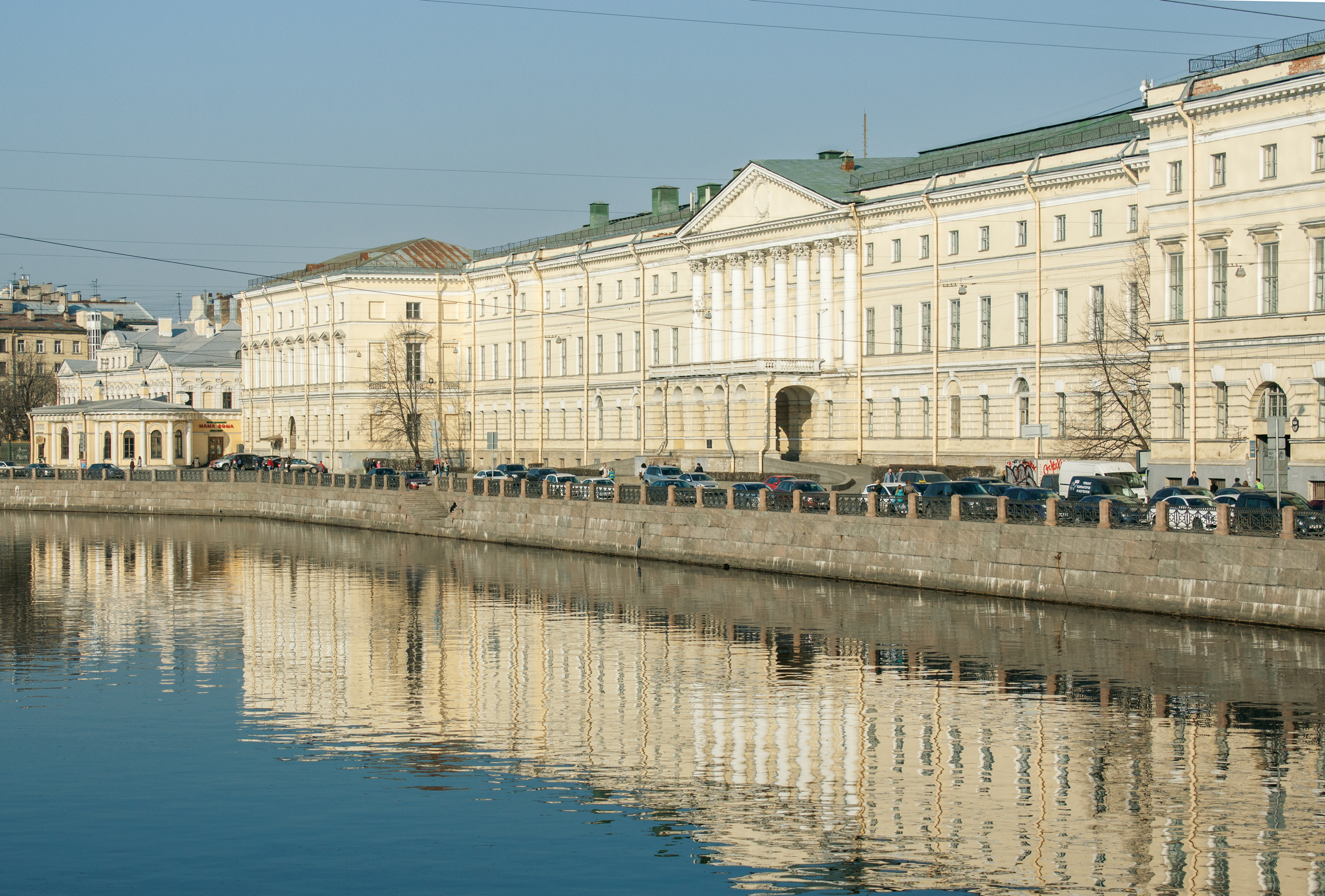 Екатерининский институт: набережная р. Фонтанки, 36, Литейный проспект, 57 (двор), Центральный район, Санкт-Петербург